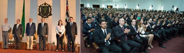 Cerimonia realizada no Palácio dos Bandeirantes no bairro do Morumbi na cidade de São Paulo